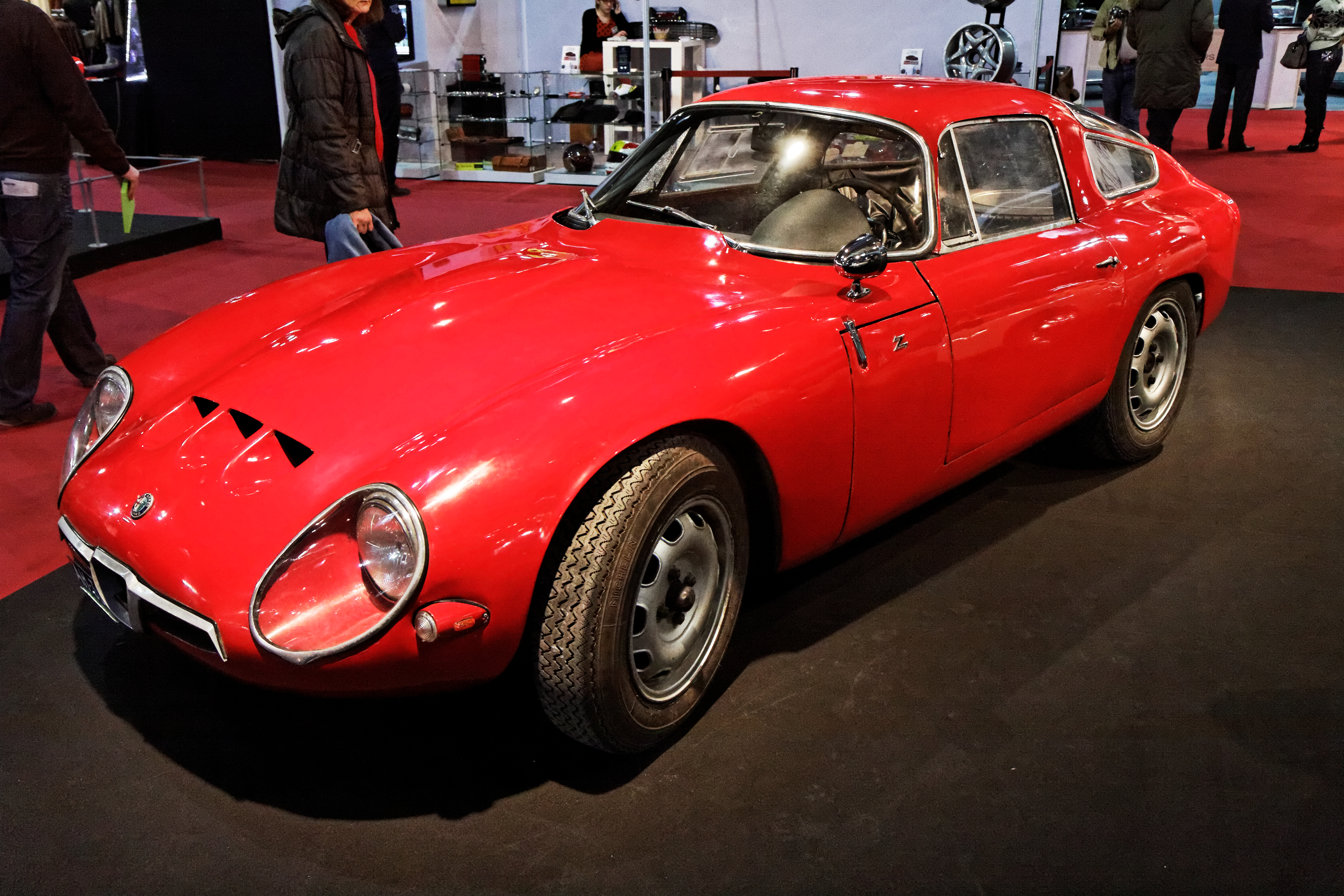 Une Alfa Romeo Giulia TZ présentée lors du salon Retromobile 2013.